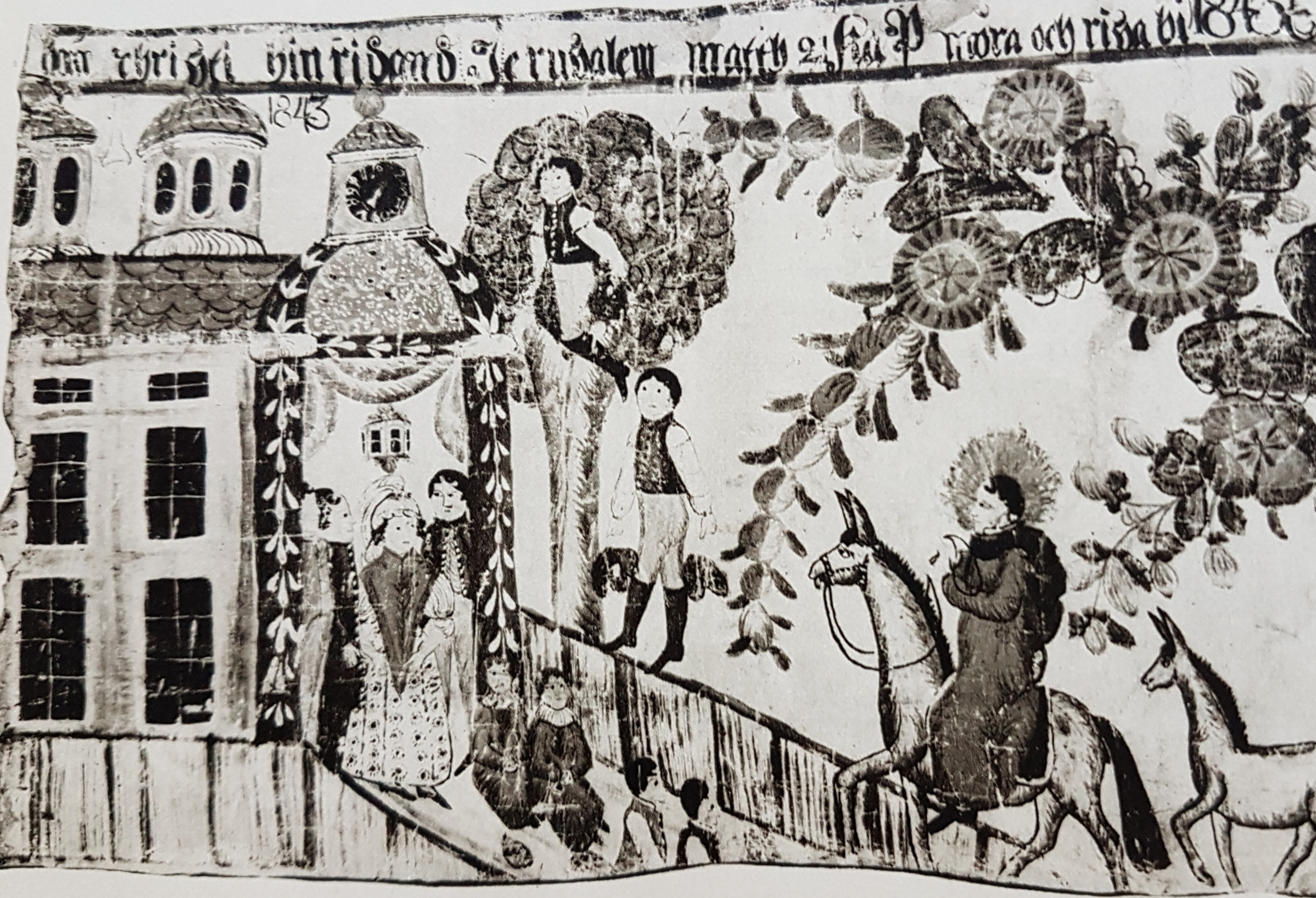 Jesus inridande i Jerusalem målad av Stikå Erik Hansson 1843, avfotograferad bild från Allhems Svenskt konstnärslexikon.